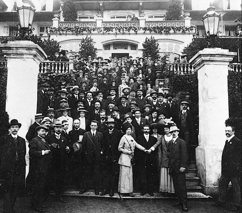 VIII Congresso della II Internazionale Socialista, Copenaghen 1910. Al centro, Alexandra Kollontaj e Clara Zetkin. Dietro di loro, Rosa Luxemburg